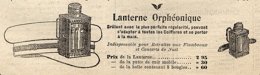 Lanterne orphéonique.